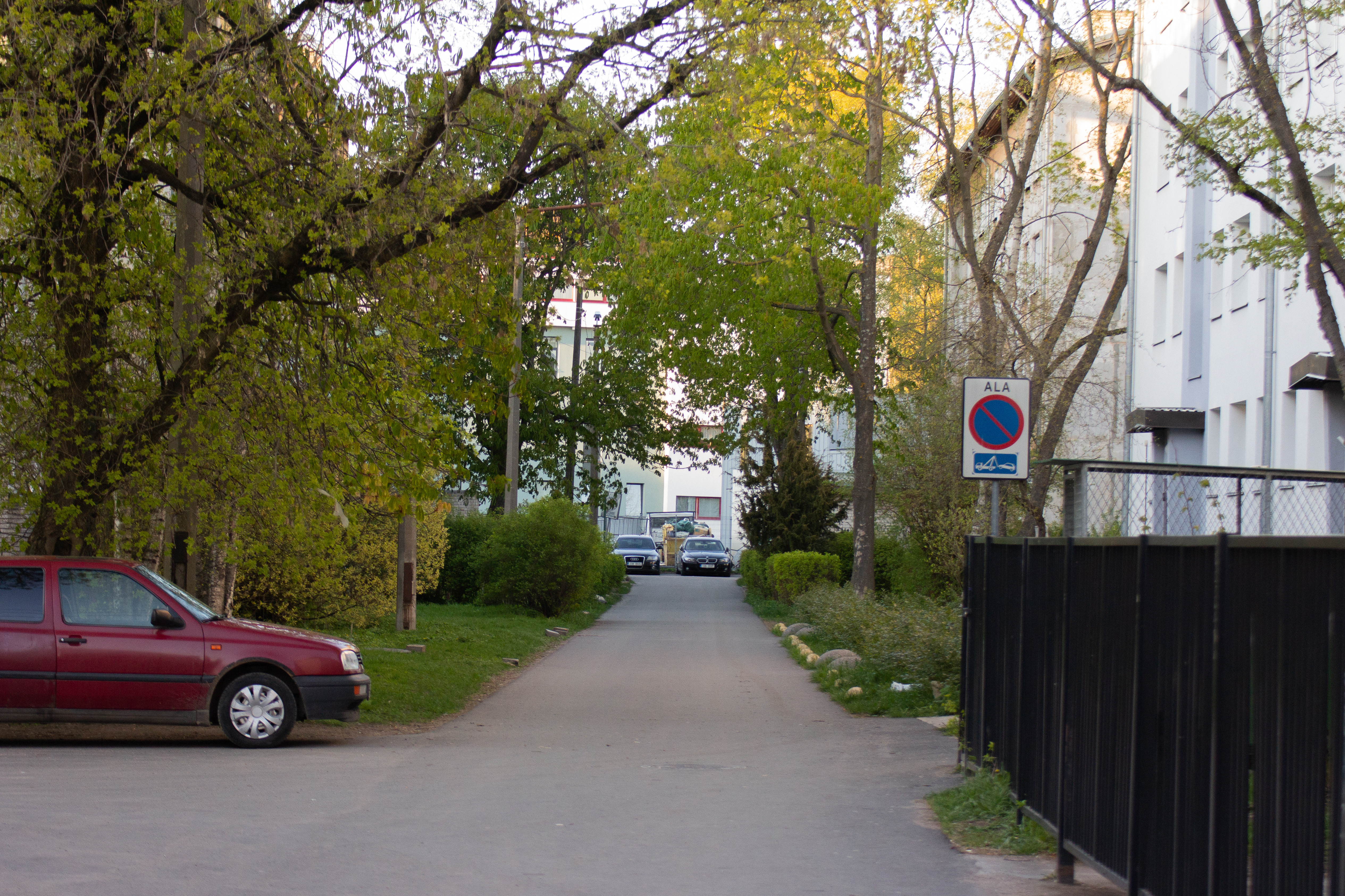 Angerja tänava algus